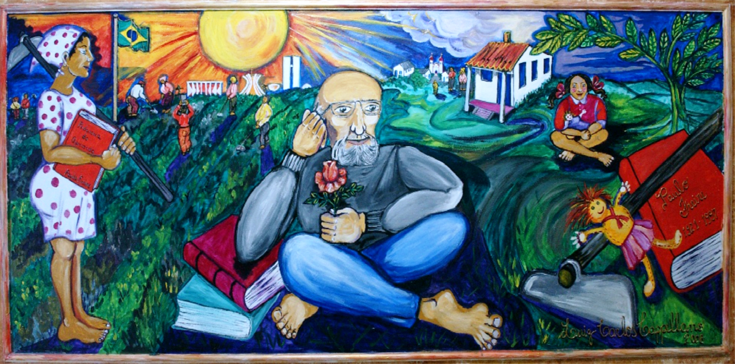 Painel Paulo Freire. CEFORTEPE - Centro de Formação, Tecnologia e Pesquisa Educacional Prof. "Milton de Almeida Santos", SME-Campinas.